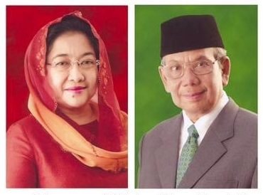 Megawati Soekarnoputri and Hasyim Muzadi as candidates in 2004 Indonesian presidental and vice presidental election